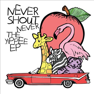 The Yippee